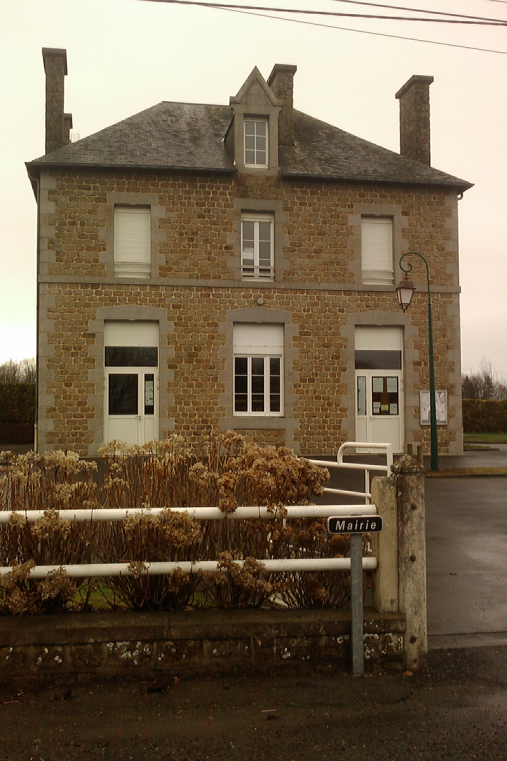 Mairie de Saint-Symphorien-des-Monts